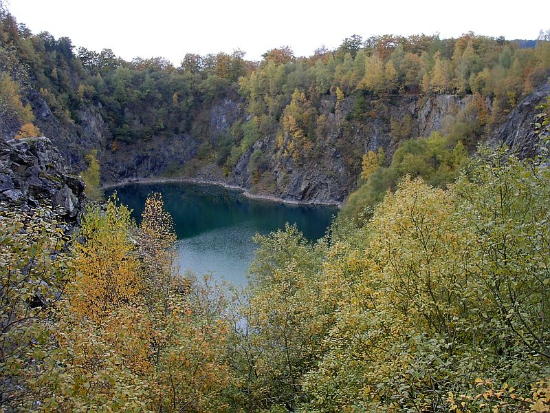 Der Bergsee von Siedlinghausen (der Bergsee des Meistersteins ist ein Überbleibsel vom einstigen Siedlinghauser Schieferabbau)